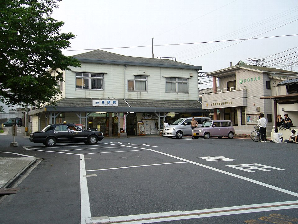 近鉄名張駅 駅舎（西口）